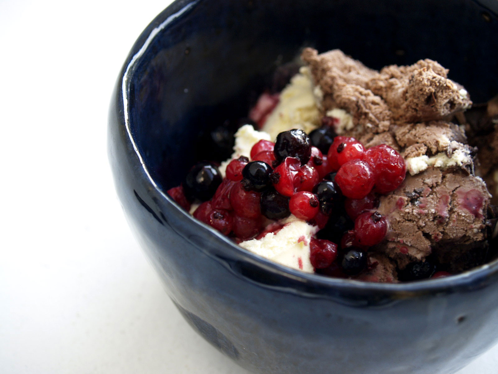 Is med skovbær